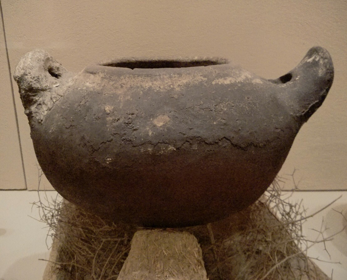 כירה מטין וקדרת בישול, בניית יד, תוצרת קדרית מהכפר אל-ג'יב, השומרון. אוסף מוזיאון ארץ ישראל, ביתן אדם ועמלו.